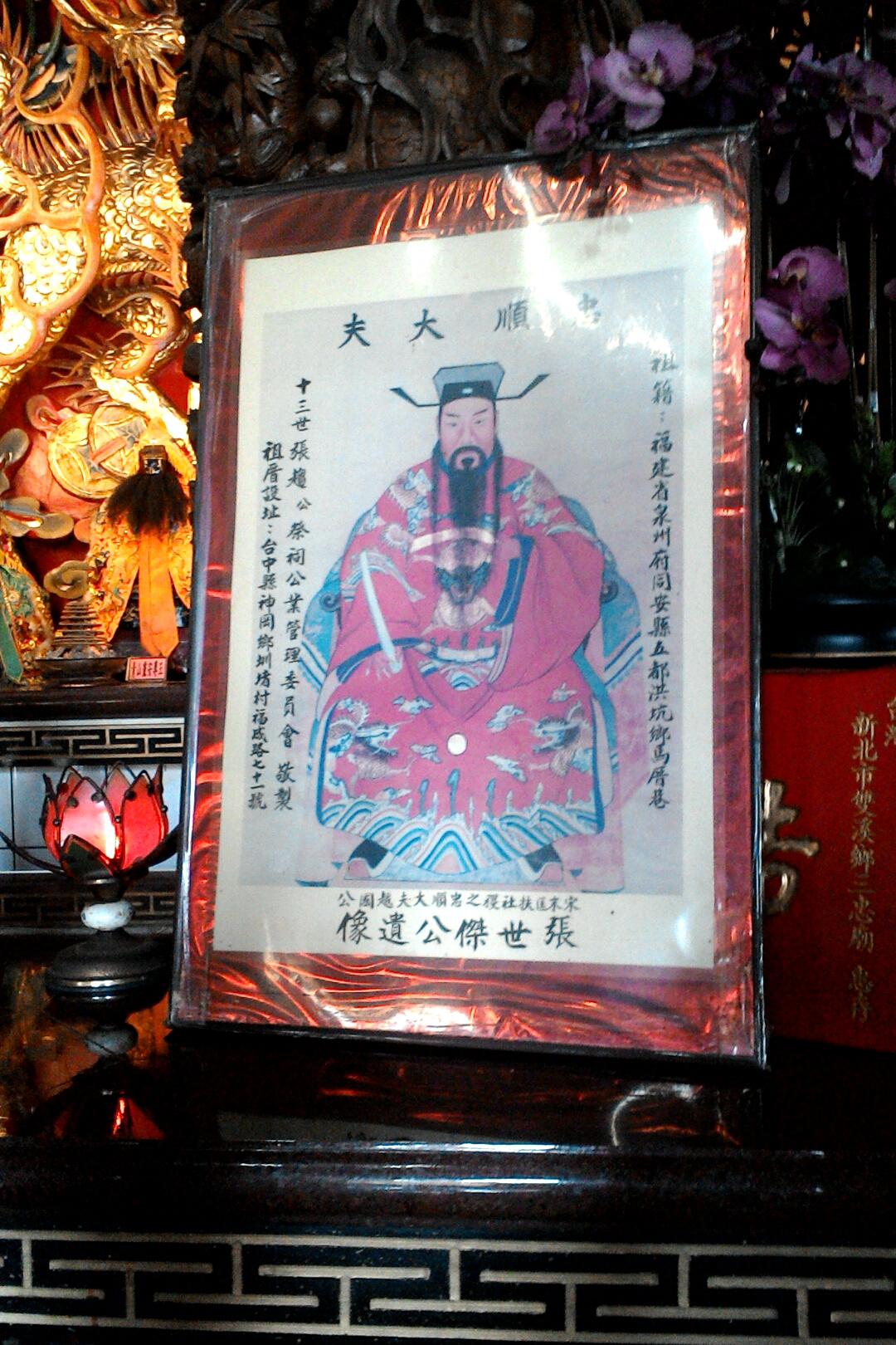 雙溪三忠廟中的張世傑像,新北市雙溪區雙溪里